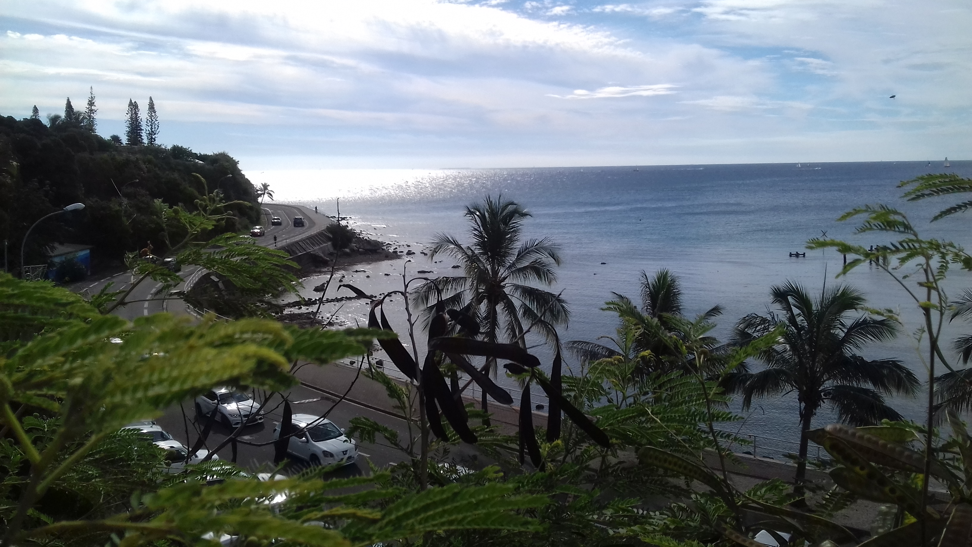 Vue de l'Aquarium des Lagons à Nouméa